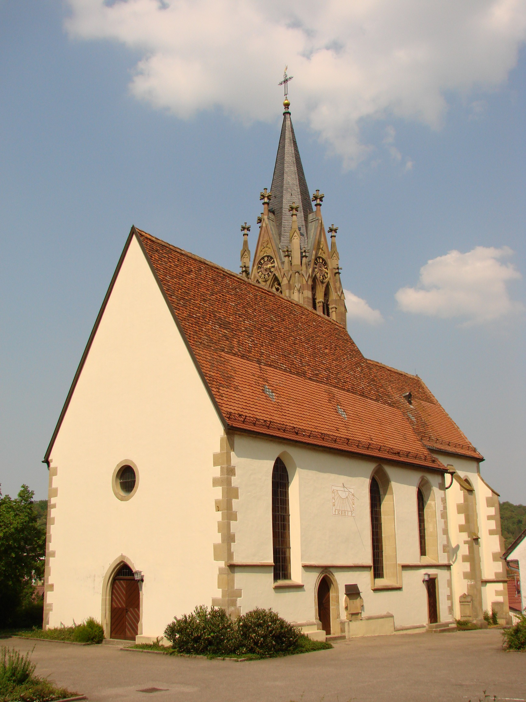 Eberdingen, church of St. Martin